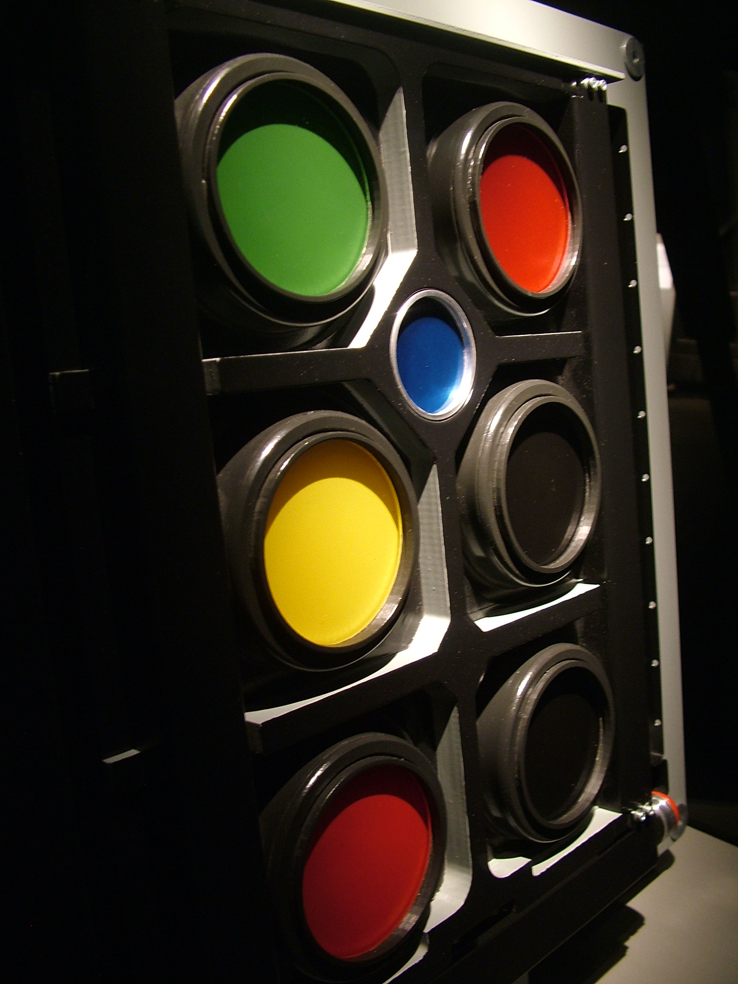 Multispektralkamera MKF-6, gebaut von der DDR und der Sowjetunion, in der Ausstellung "Sternstunden" in Oberhausen